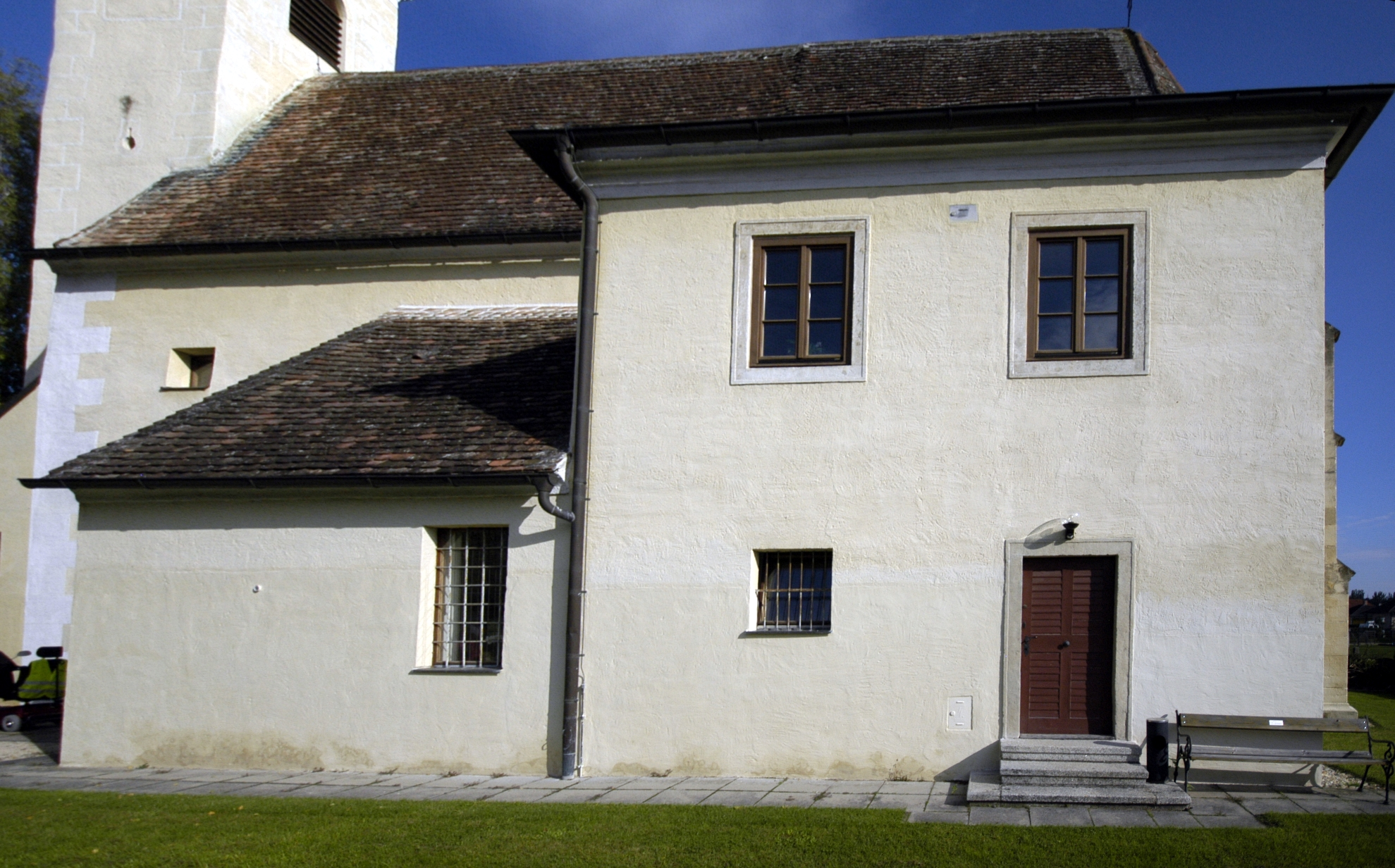 Kath. Pfarrkirche hll. Peter und Paul Südkapelle und Sakristei